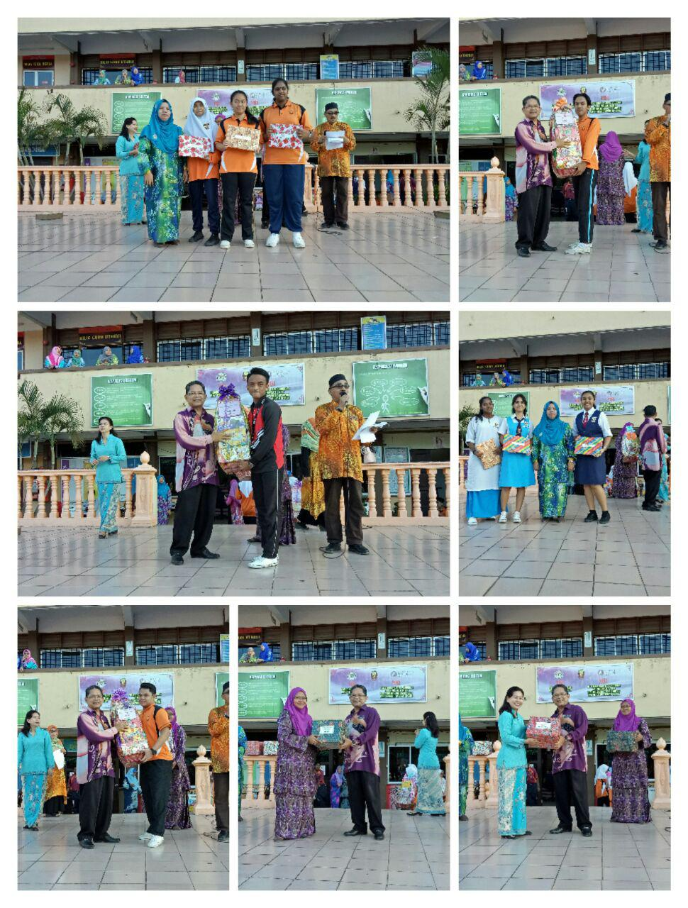 Penerima Hadiah sempena Bulan Kemerdekaan